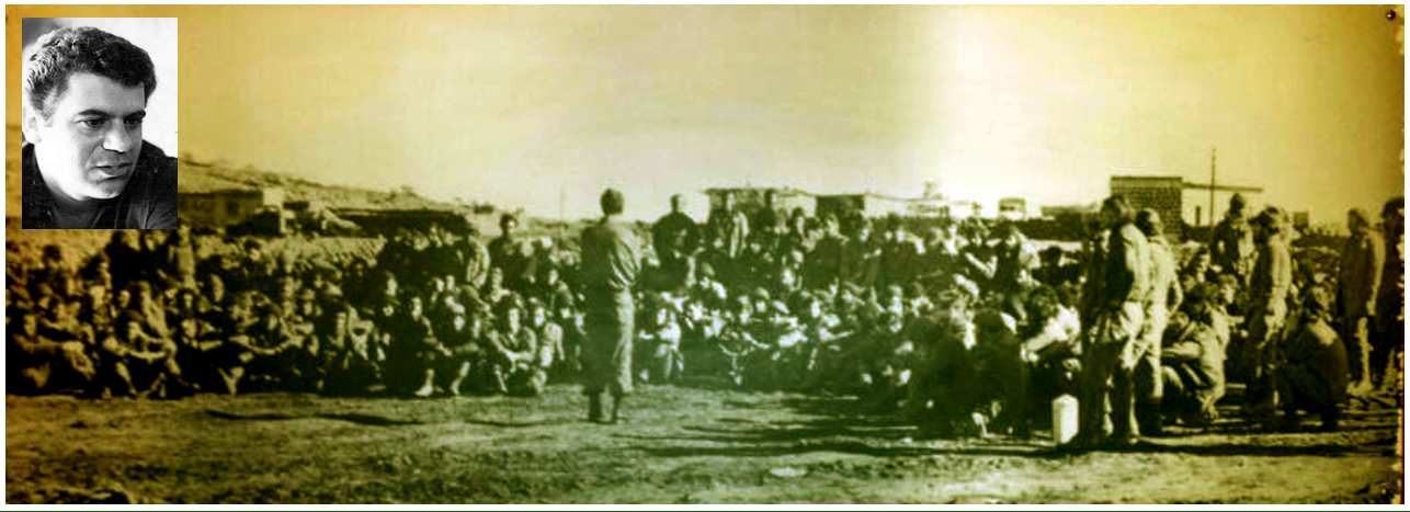 שיחת הסיום עם פירוק כוח נתי. עומד בגבו למצלמה הסמג"ד עמרי נגב.